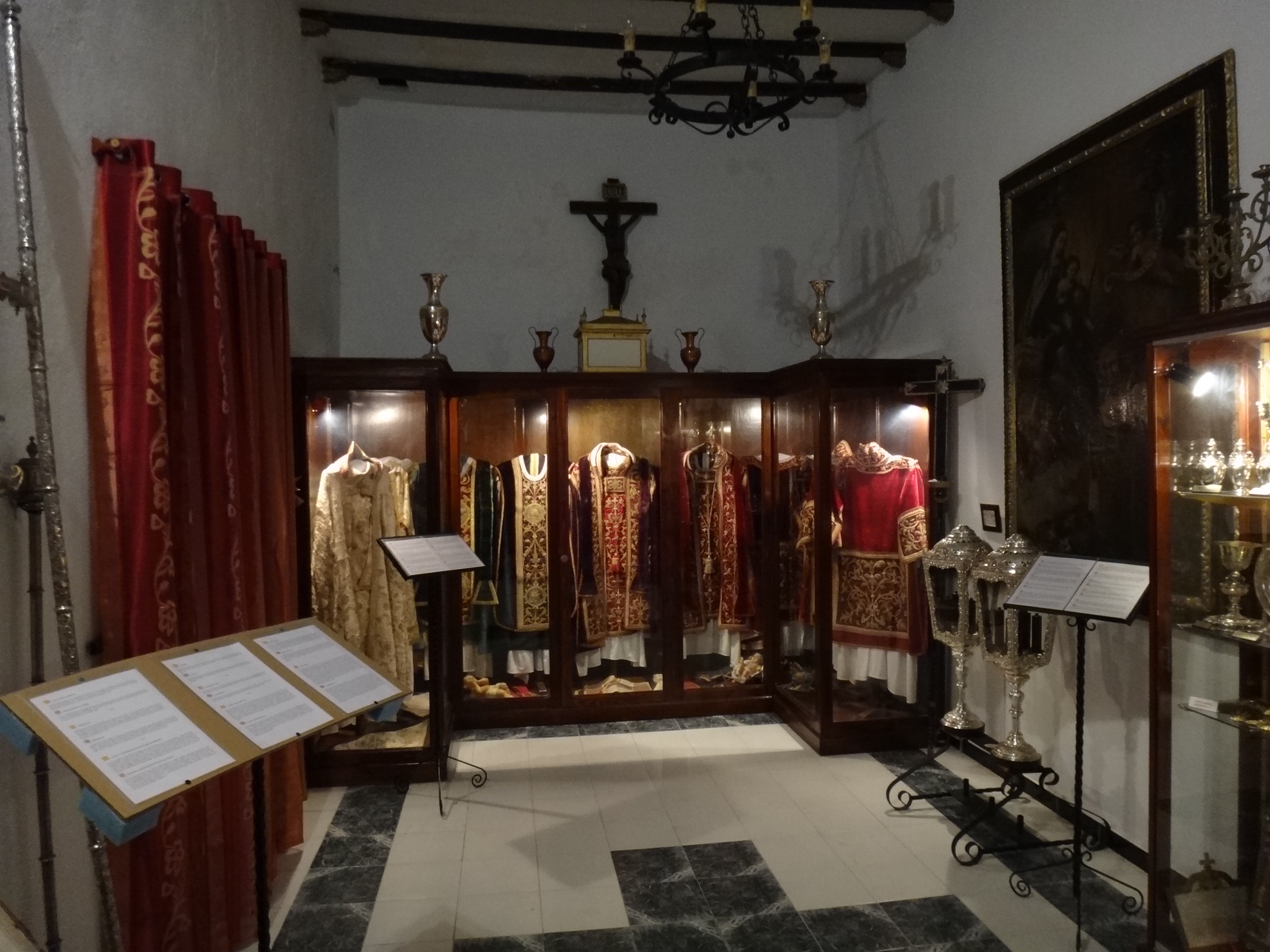 Iglesia de Santa María de la Mesa. Zahara de la Sierra (Andalucía, España)